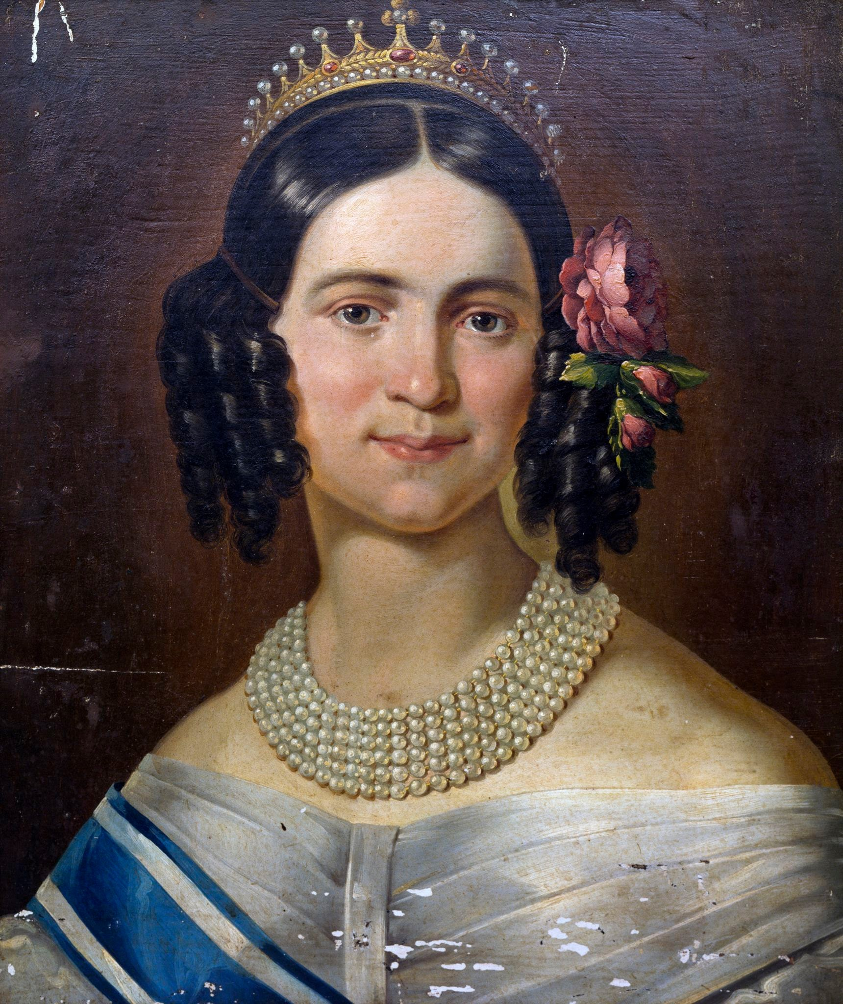 Ultima duchessa di Modena dal 1846 al 1859. Moglie di Francesco V d'Austria-Este, duca di Modena, Reggio, Guastalla, Massa Carrara, Lunigiana e Garfagnana.